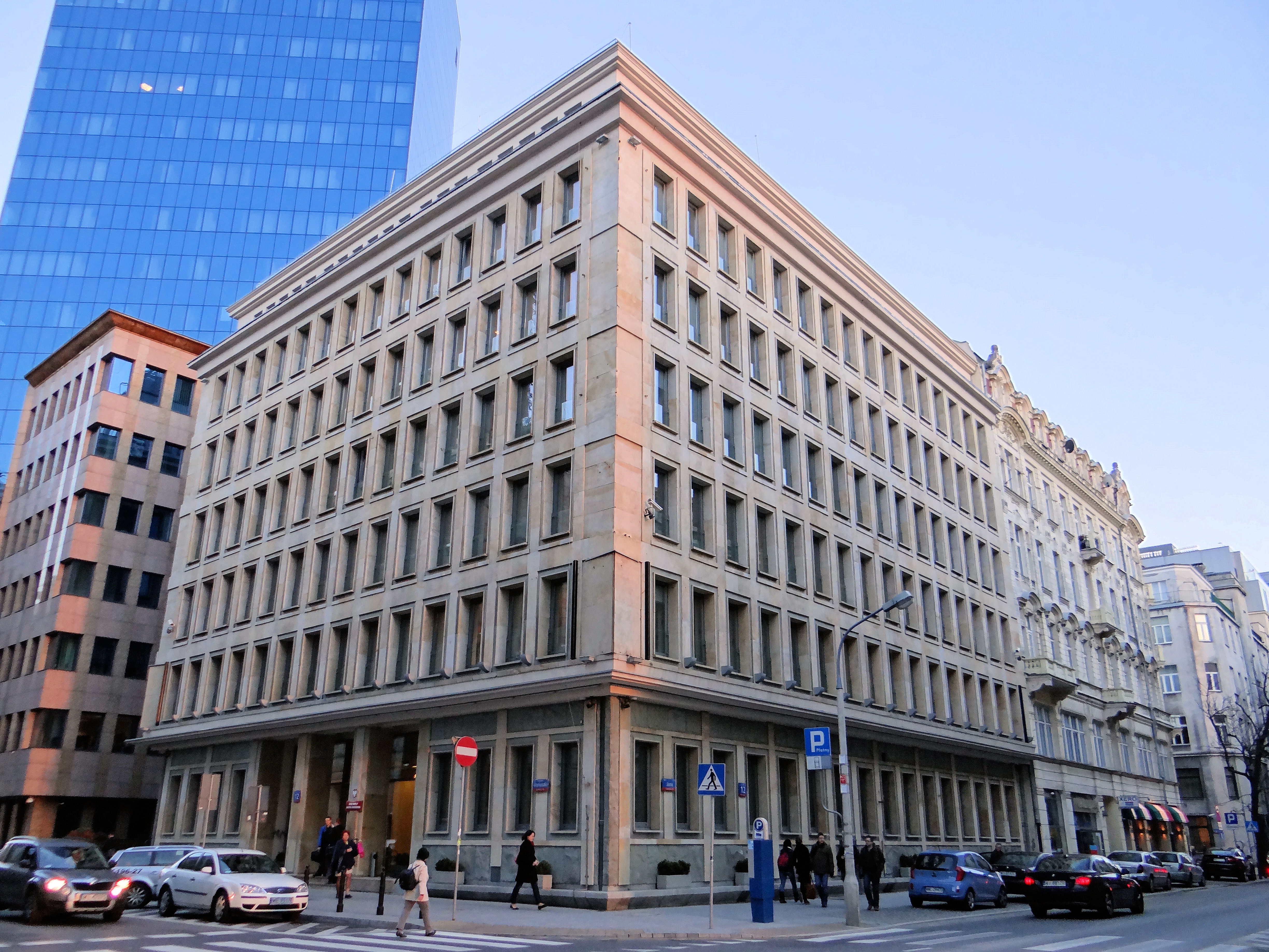 ul Jasna 12 w Warszawie